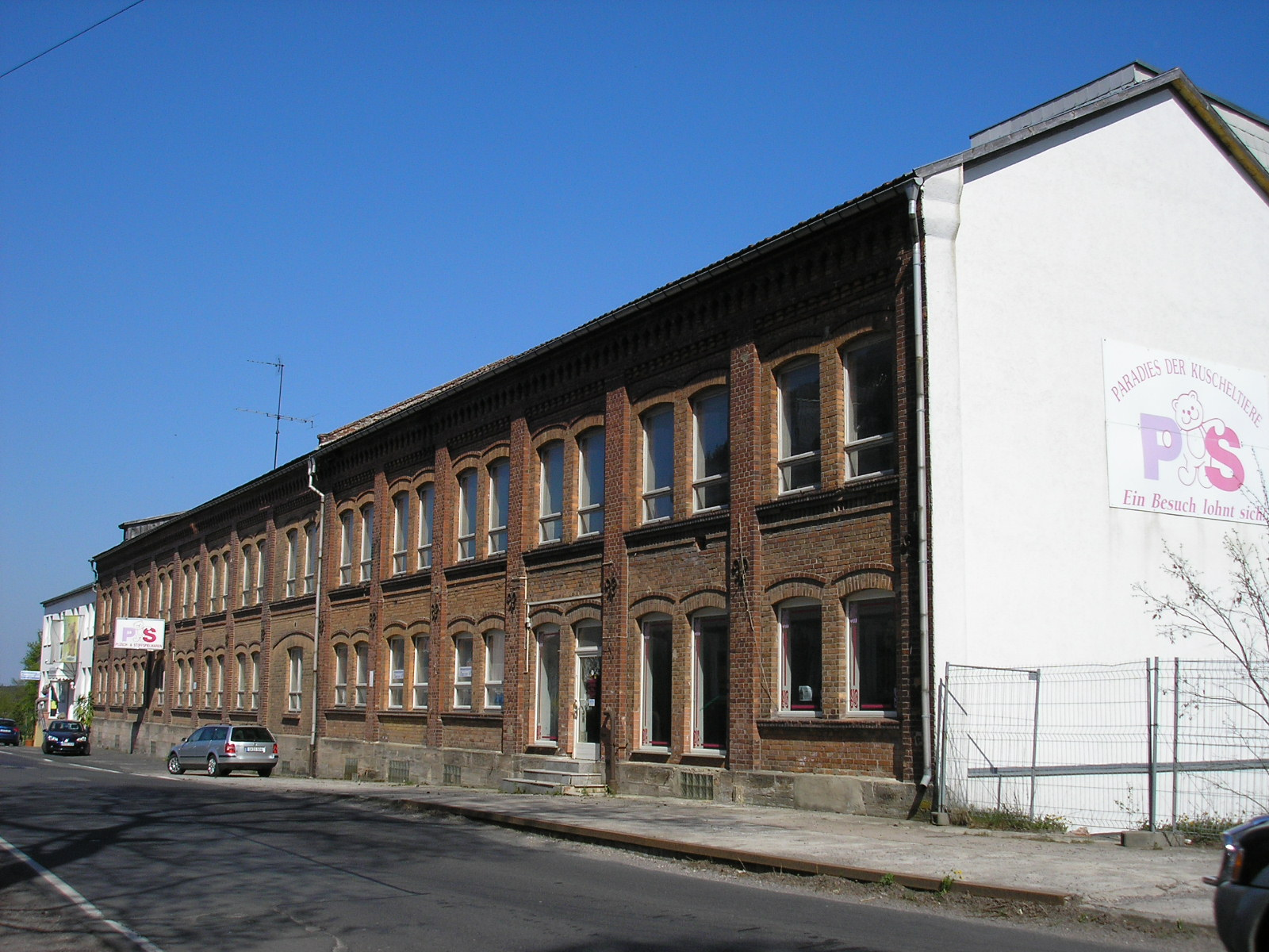 Plüschwarenfabrik in Gehren (Thüringen).